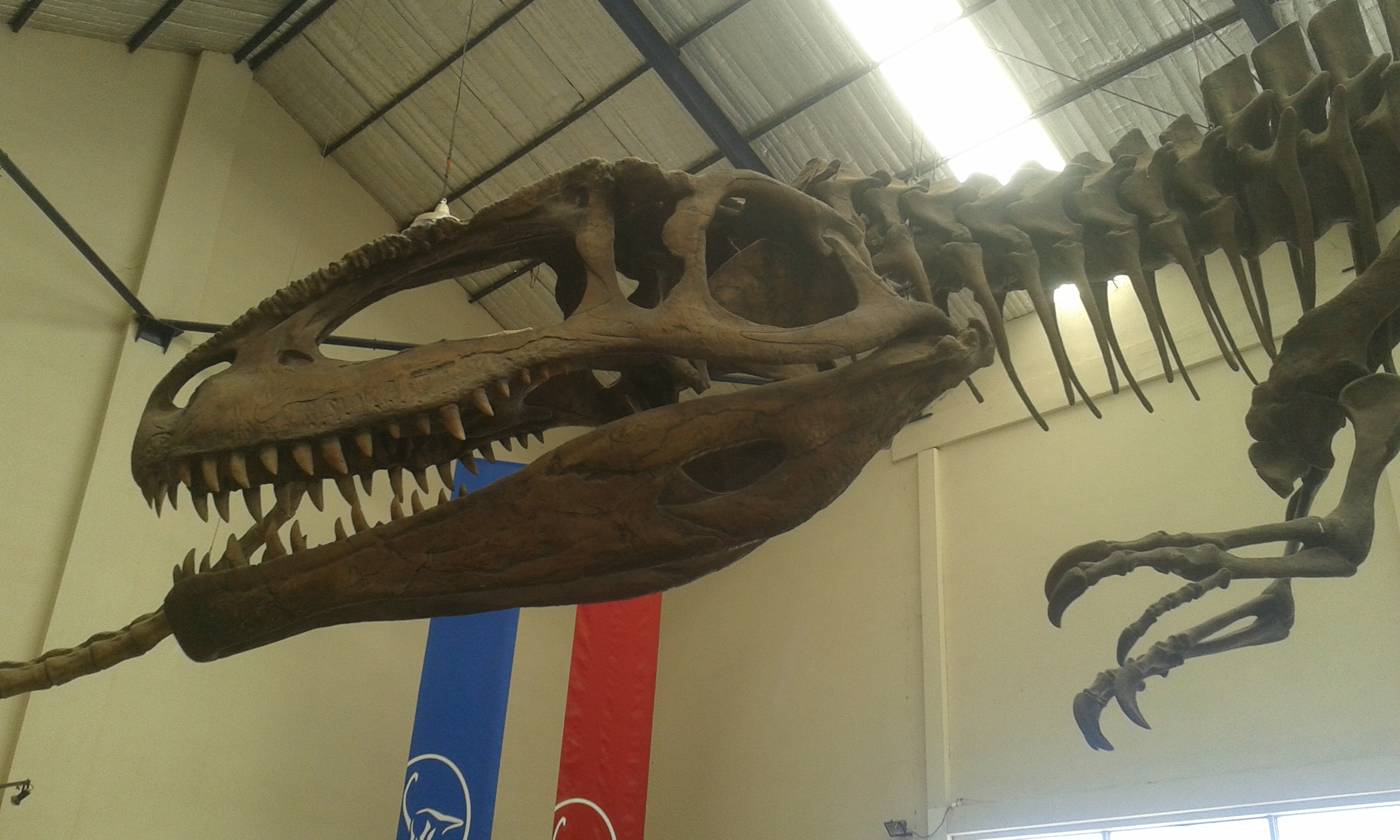 Imagen tomada en el Museo carmen Funes, esta imagen se enfoca el cráneo de un Giganotosaurus. Uno de los mayores dinosaurios carnívoros que han existido.